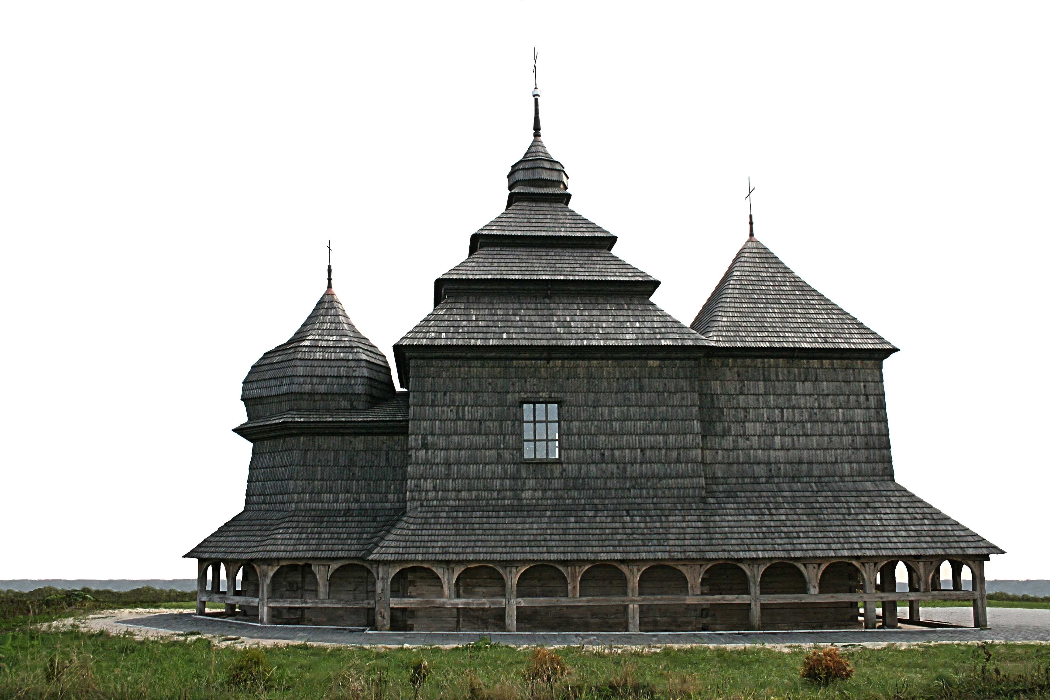 Михайлівська ц-ва